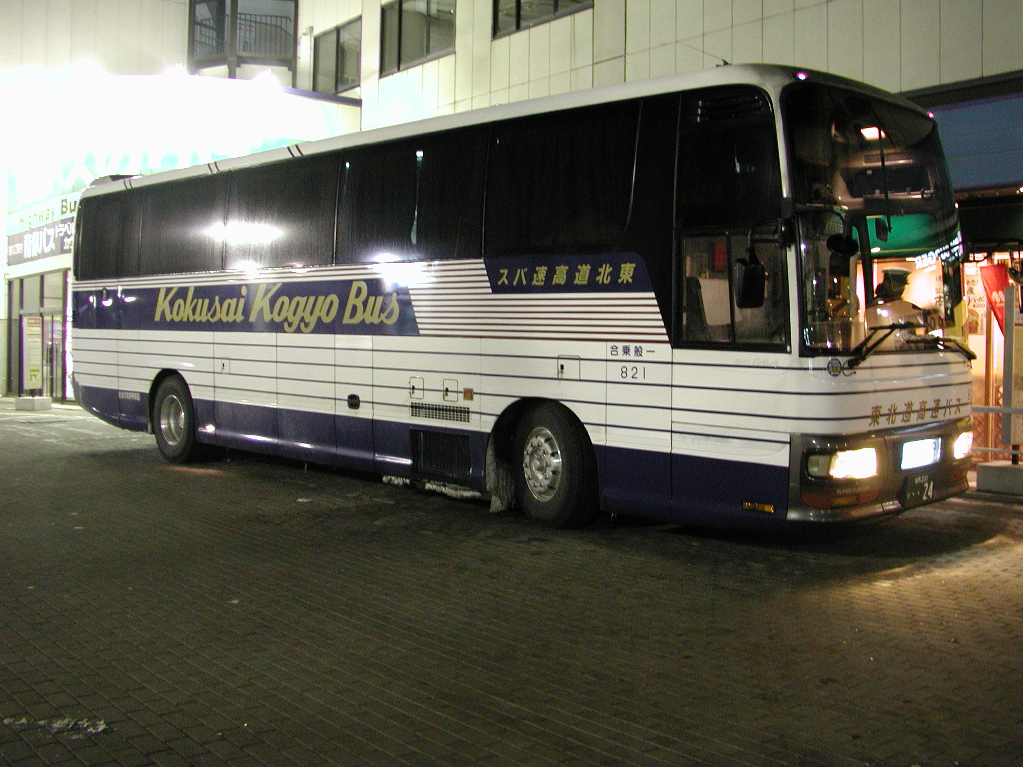 国際興業高速路線塗装（社号：821/いすゞ・ガーラ：KC-LV782R1/シリウス号運用） 八戸ラピアバスターミナルにて